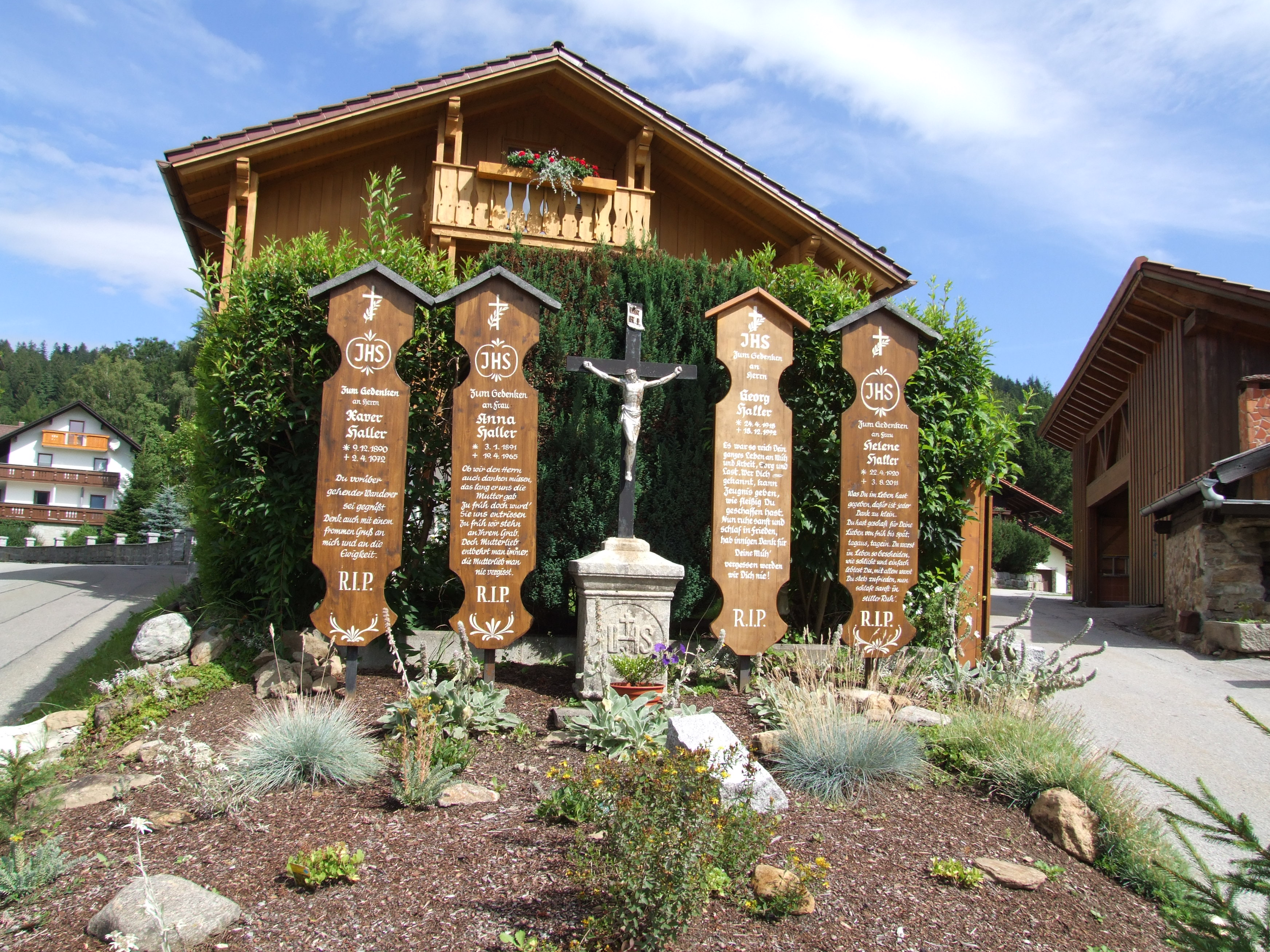 Totenbretter in Bodenmais, Nähe Rißlochweg